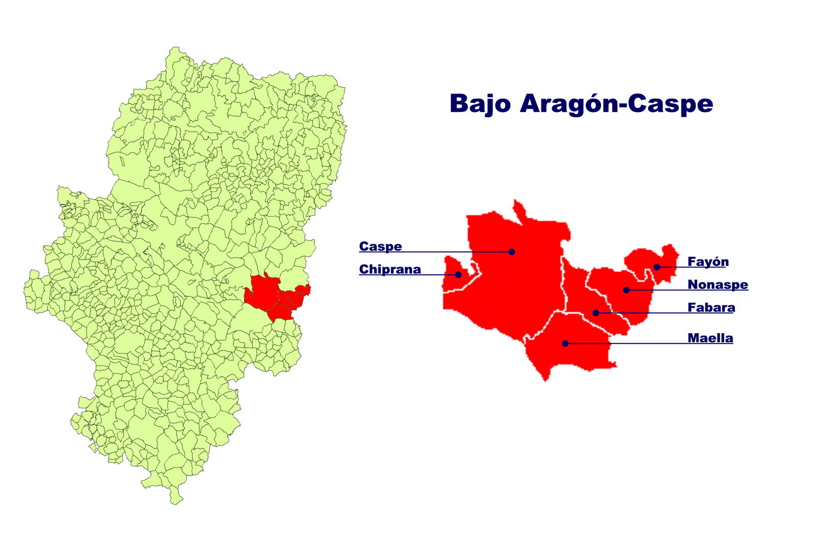 Comarca de Bajo Aragón-Caspe Creado el 28.08.2005 por Ecelan en base a Image:Aragon municipalities.png